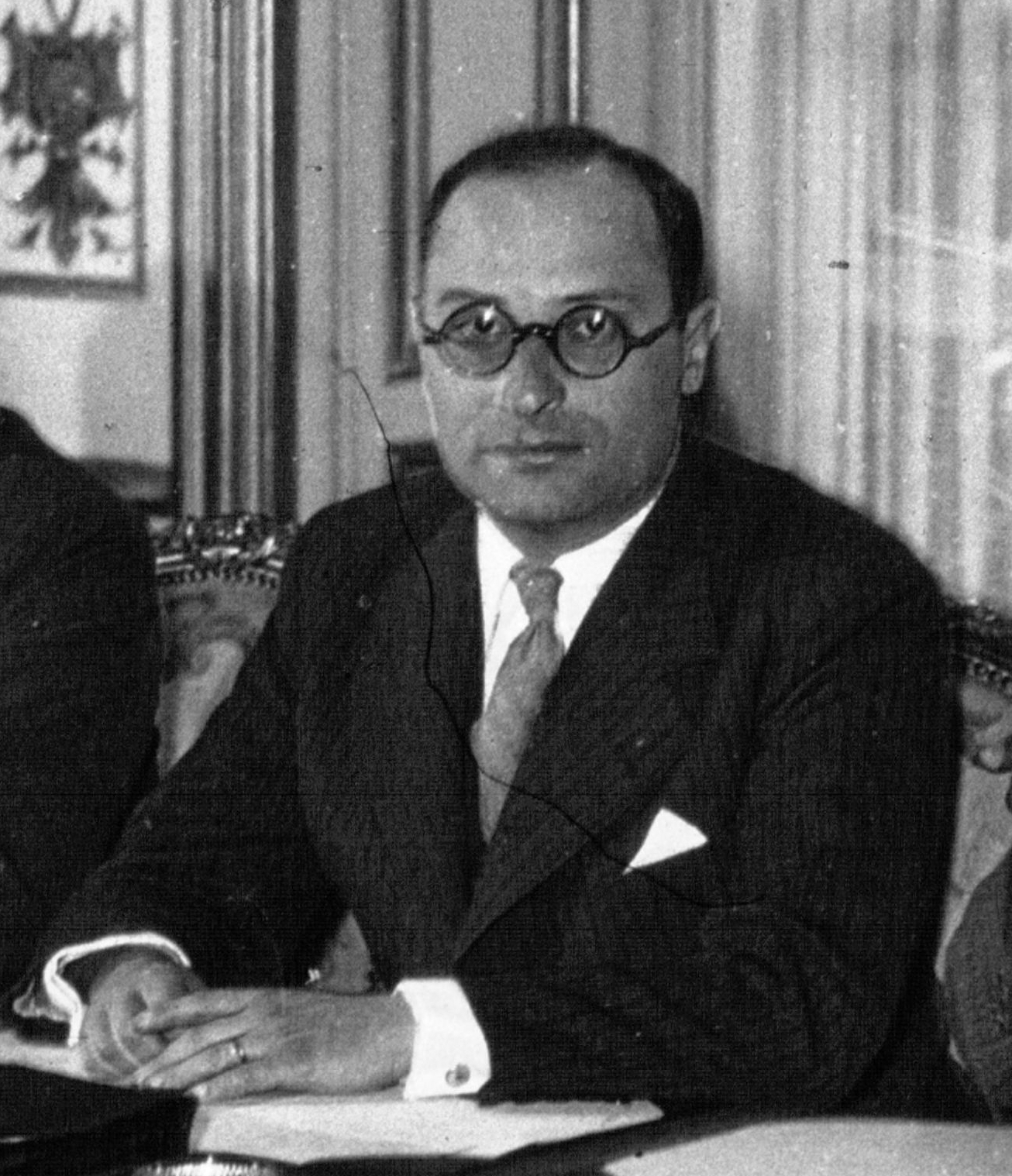 Jean Zay, lors d'un conseil des ministres du Gouvernement Camille Chautemps III, 1937